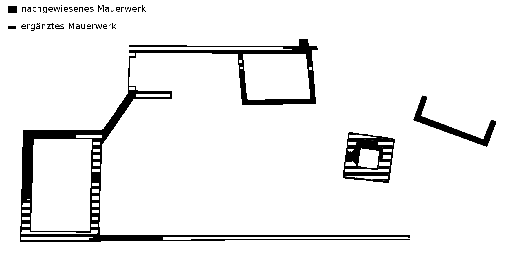 Rekonstruierter Plan der Burganlage Iberg(Quelle: Infotafel der Kantonsarchäologier), Riniken AG, Schweiz